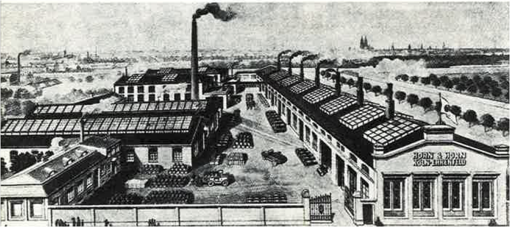 Darstellung des Zweihorn-Werks um das Jahr 1912